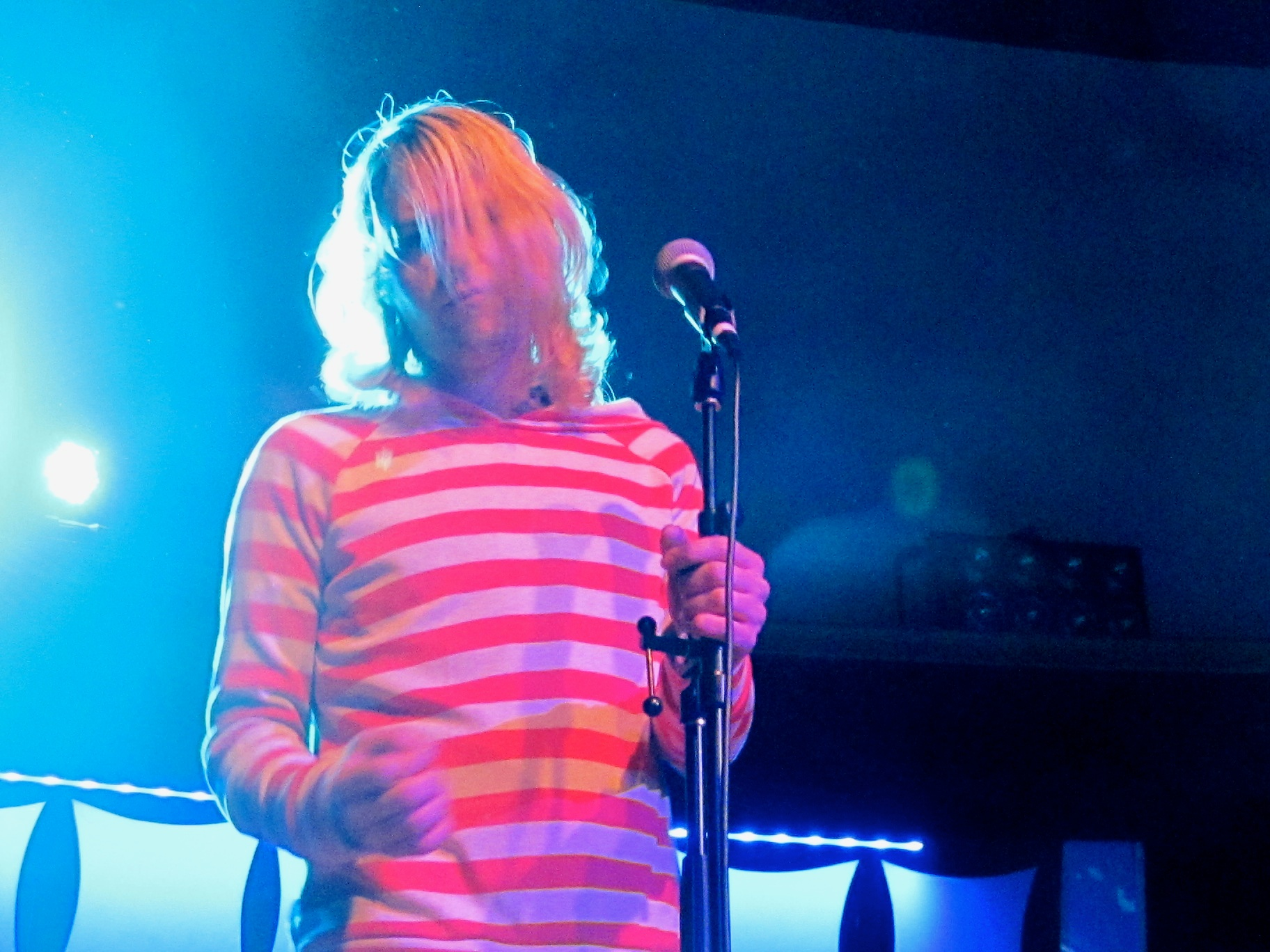 Ariel Pink